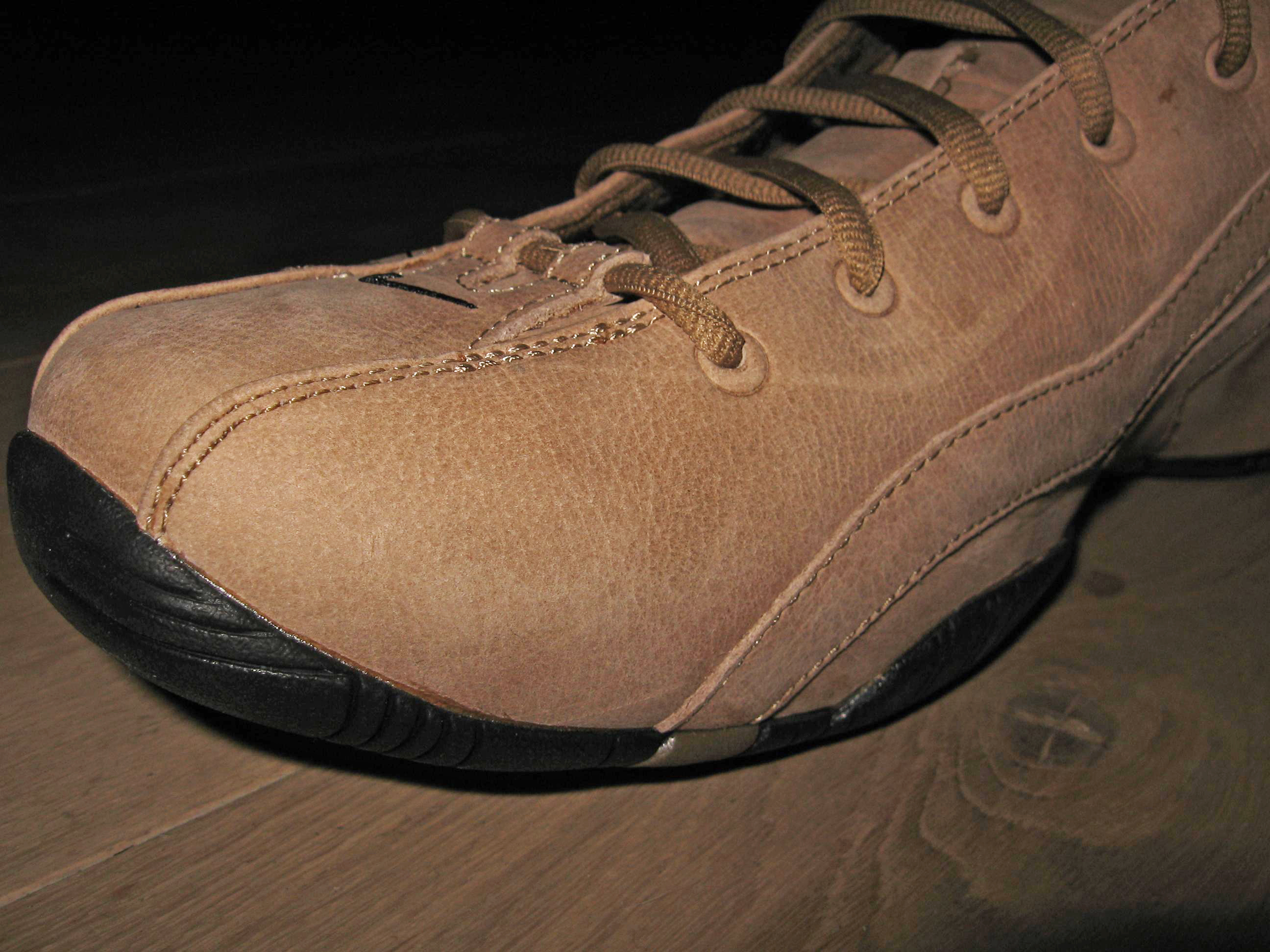 Nubuk